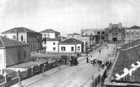 תל אביב בשנותיה הראשונות מתוך אתר "תל אביב במבט ראשון" (ובידיעת בעלי האתר)